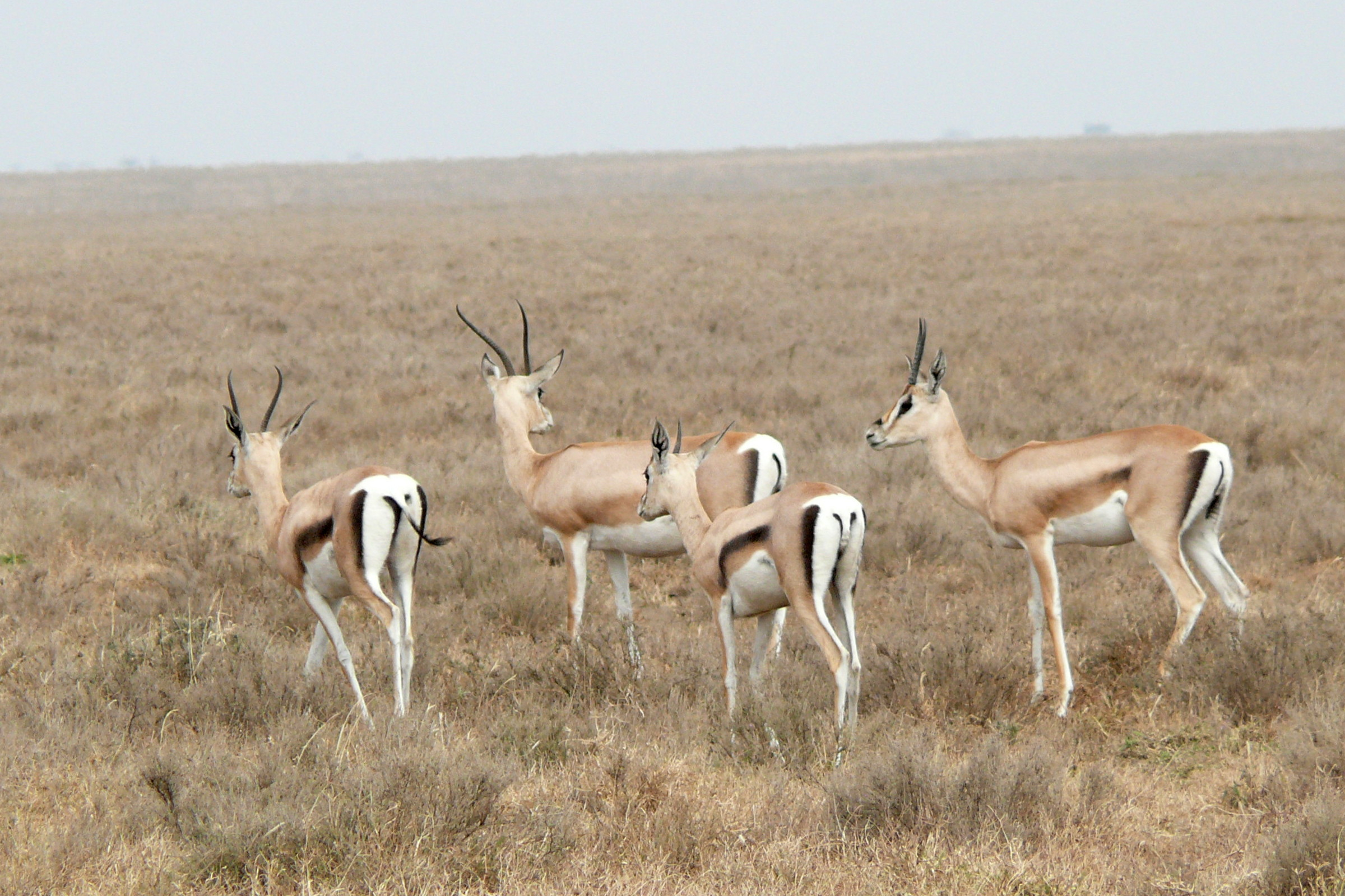 Grant-Gazelle (Nanger granti)